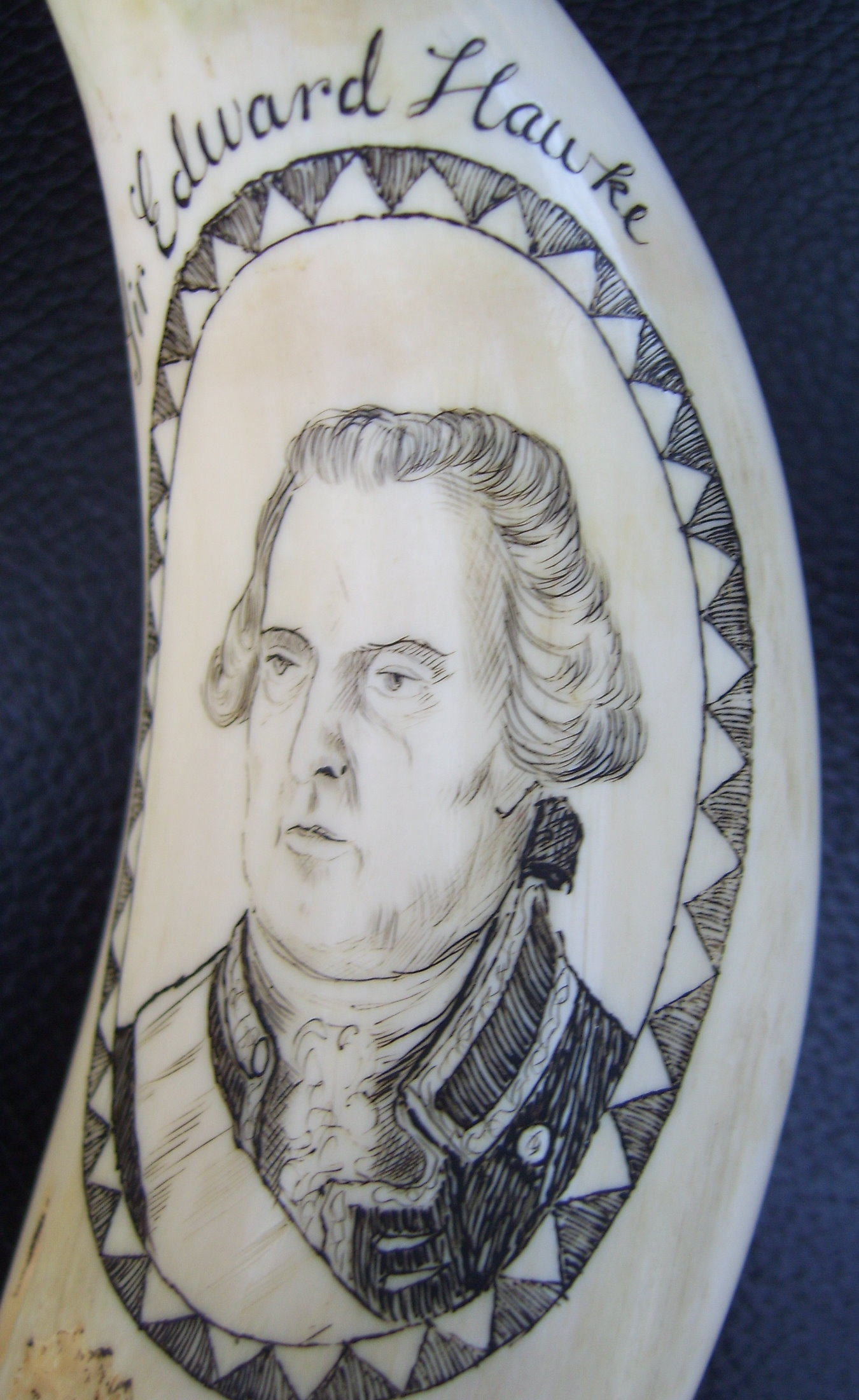 Gravur, Bild des Sir Edward Hawke, britischer Admiral im Kampf gegen Frankreich im 18. Jahrhundert, auf einem Walzahn graviert 19. Jh., unbekannter Seemann als Graveur